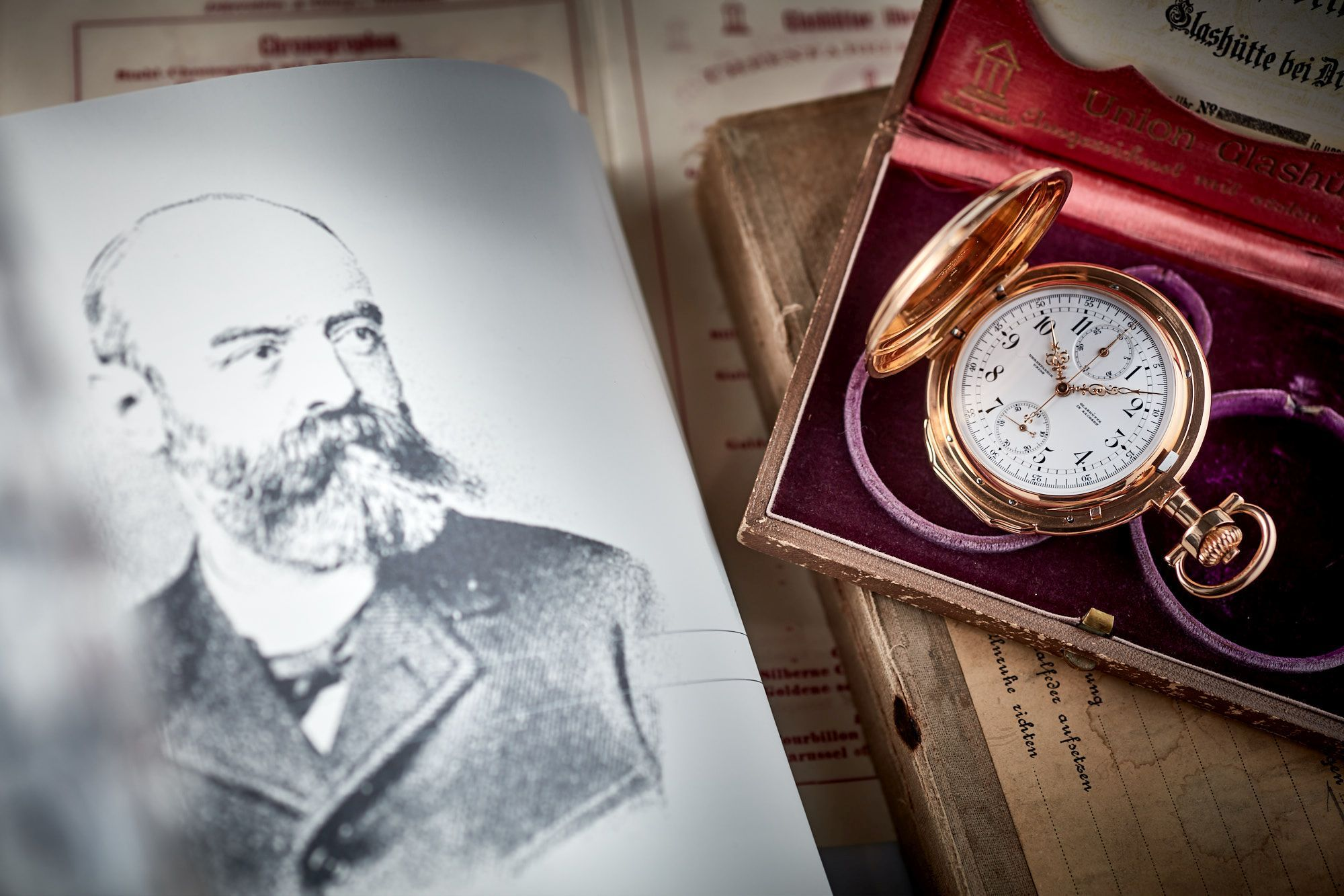 © Stiftung Deutsches Uhrenmuseum Glashütte